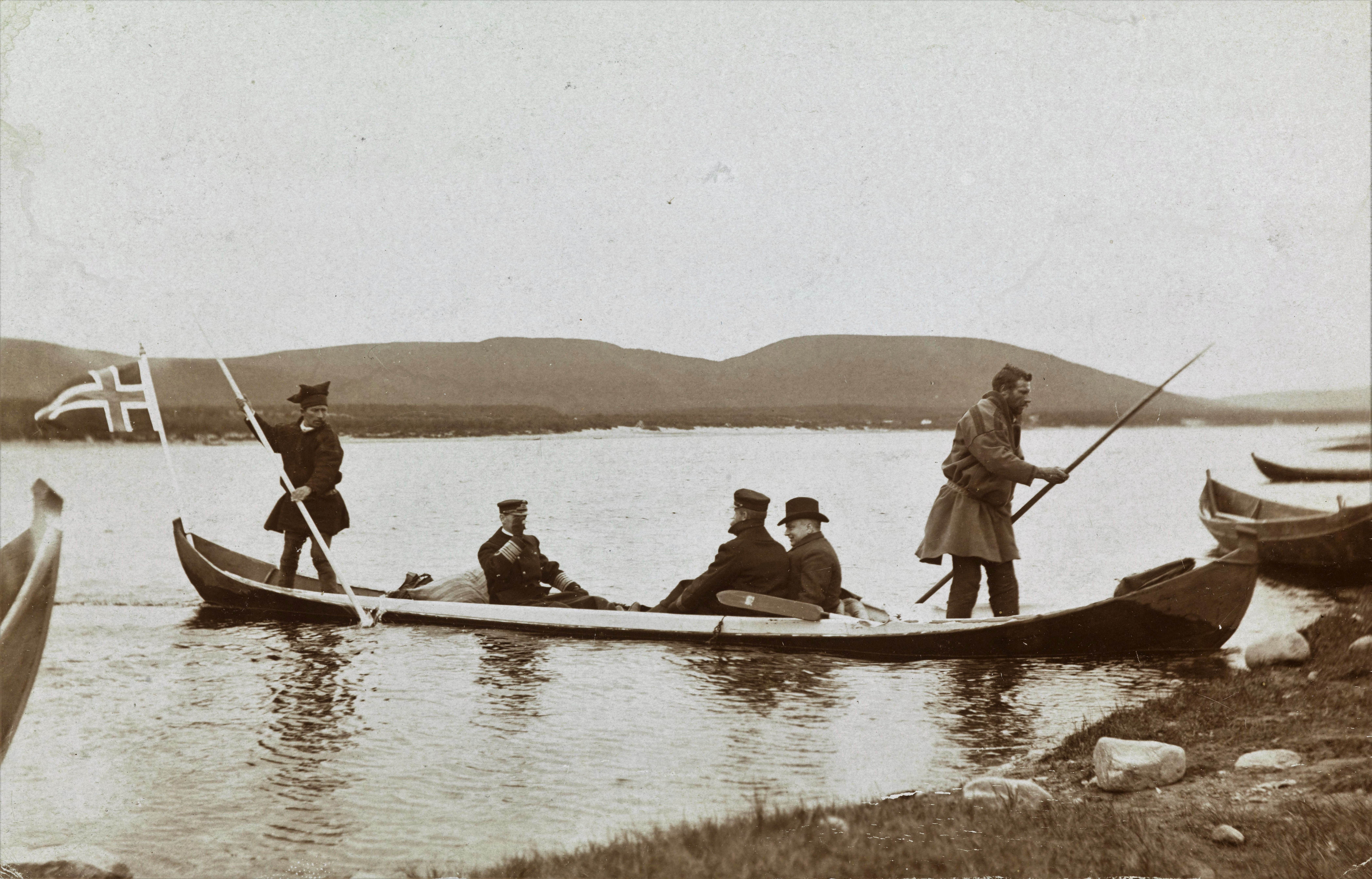 Bildet er hentet fra Nasjonalbibliotekets bildesamling. Anmerkninger til bildet var: Bildet ble tatt under kongeparets andre kroningsreise, som gikk til Nordland og Finnmark sommeren 1907. Tana, Tana, Finnmark Depicted person: Haakon VII konge av Norge